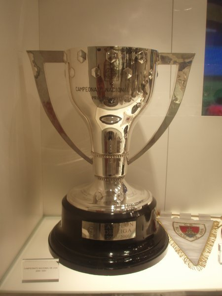 Trofeo de la Liga BBVA